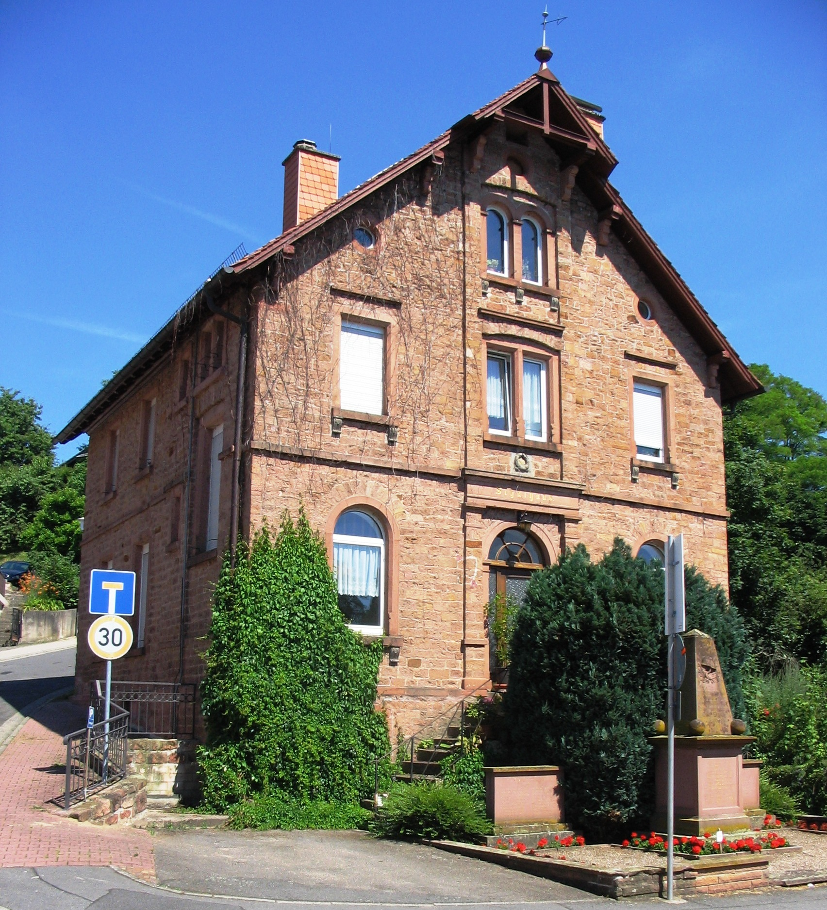 Denkmalgeschütztes Schulhaus von 1880 in der Mitte von Dorf-Erbach, aus Sandsteinquadern erbaut